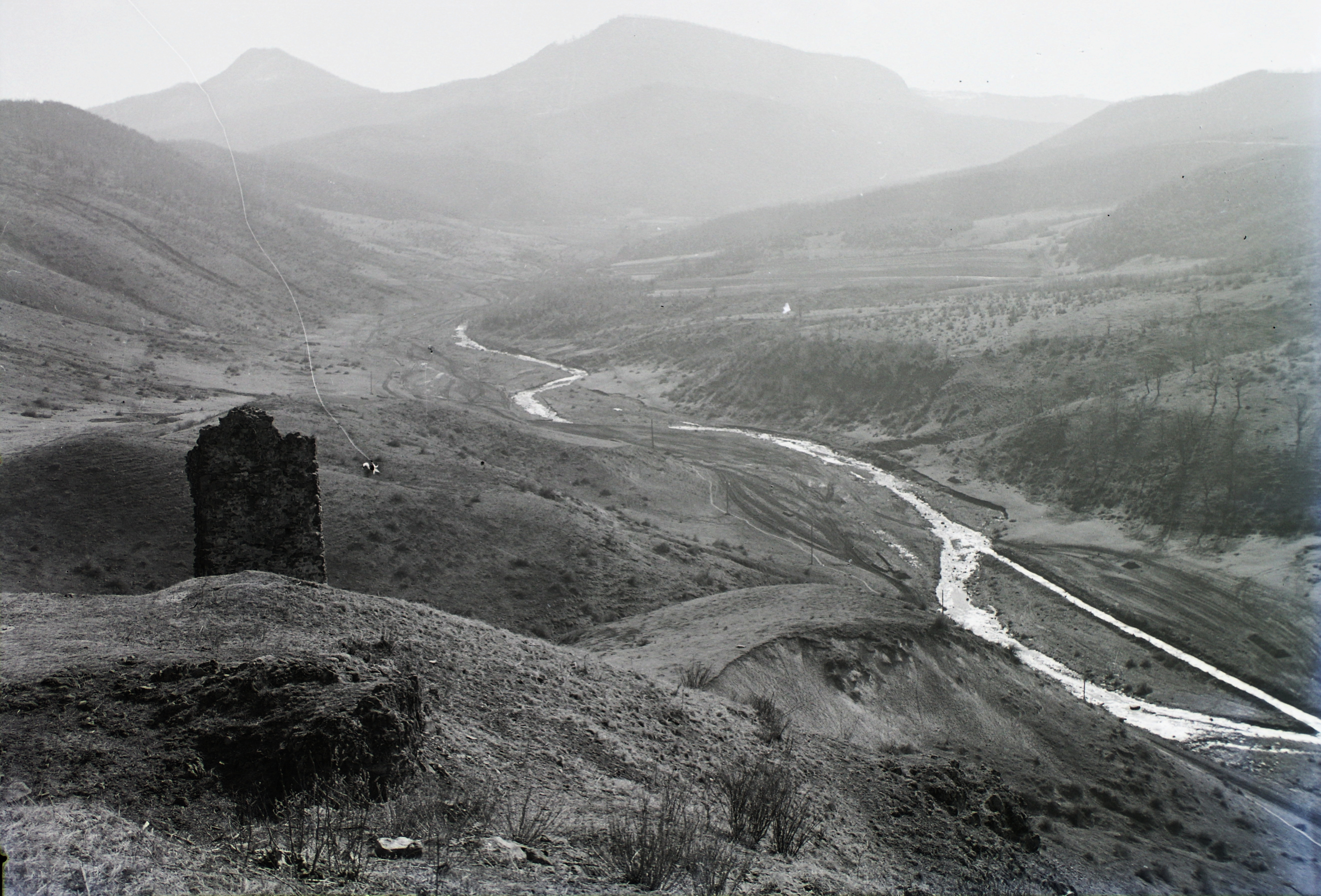 Hasznos (ekkor önálló, ma a város része), balra a várrom, távolban a Mátra. Location: Hungary Title: Hasznos (ekkor önálló, ma a város része), balra a várrom, távolban a Mátra.